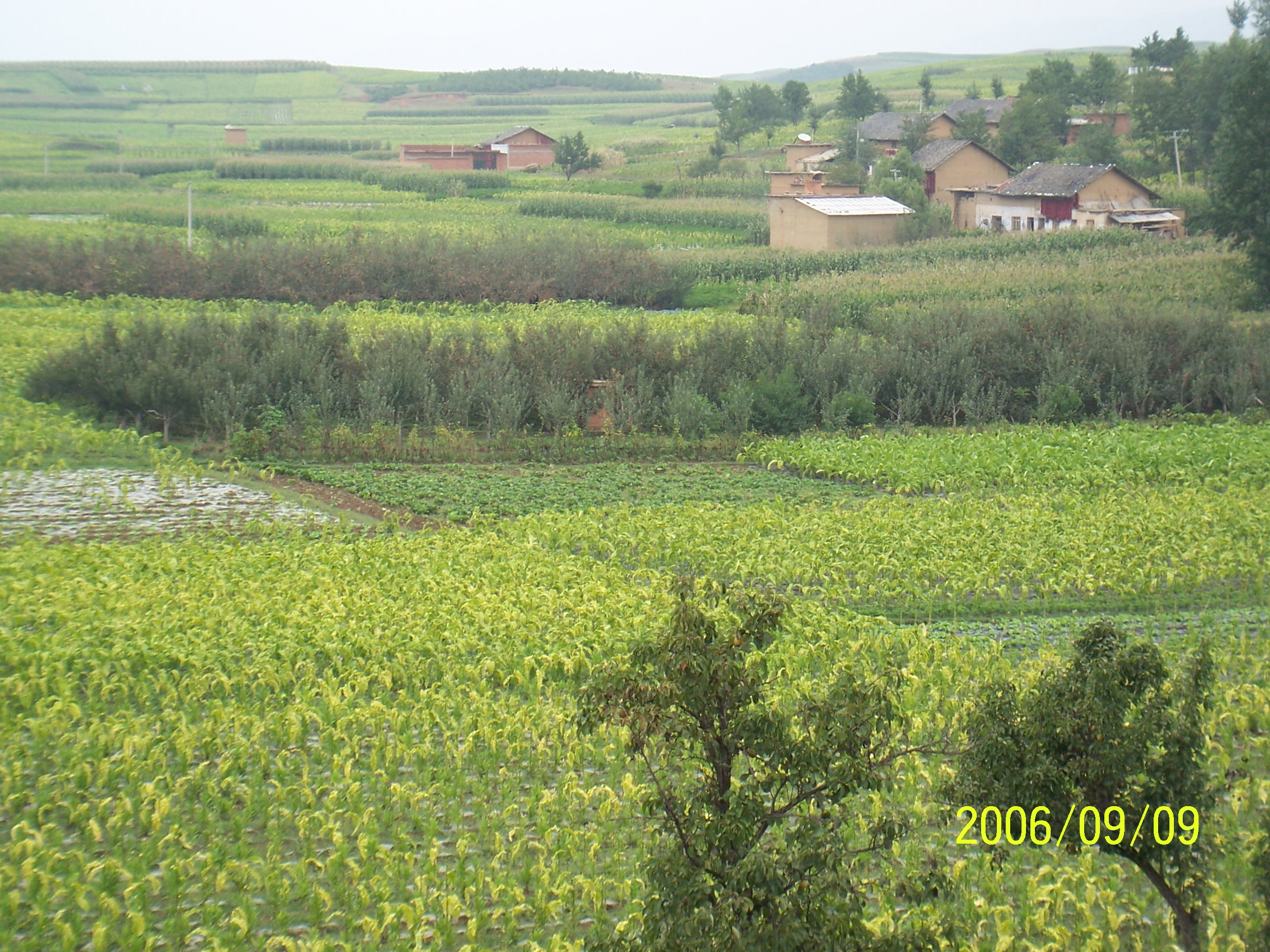 守望乡八仙村马家院子